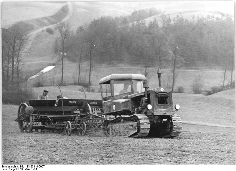 LPG Jahna, Aussaat Zentralbild Siegert-19.3.1954 LPG "Walter Ulbricht" in Jahna beendete Frühjahrsaussaat. Die Landwirtschaftliche Produktionsgenossenschaft "Walter Ulbricht" in Jahna konnte am 17.3.1954 melden, dass sie die Frühjahrsaussaat vorfritstig abgeschlossen hat. Damit ist die Genossenschaft die erste im Bezirk Dresden, die diese Arbeiten beendet hat. Auf die Frage, warum die Genossenschaftsbauern so vorbildlich arbeiten kommten, antworteteder Arbeitsorganisator Kottmus: "Wir haben vor allen Dingen im Winter eine gute Planung durchgeführt, die wir nun in die Tat umsetzten. Besonders wesentlich war dabei die gute Zusammenarbeit mit unserer MTS in Schletta, die uns in jeder Weise vorbildlich unterstützte". UBz: Mit zwei gekoppelten Sämaschinen wird auf diesem Genossenschaftsfeld der letzte Hafer gedrillt. Traktorist ist Kollege Roßberg von der MTS Schlätta.